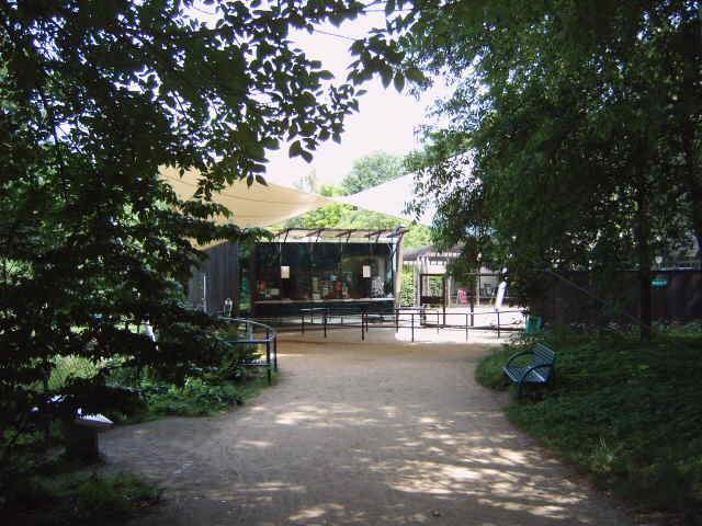 Eingang des Tierparks Cottbus, Land Brandenburg, Deutschland